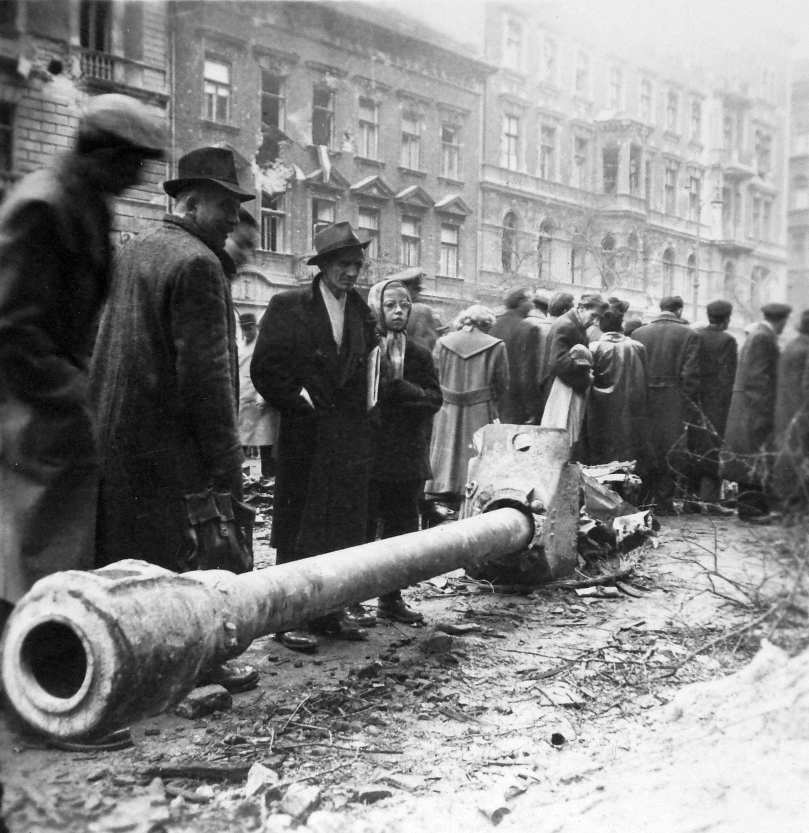 Budapest 1956. József körút, Práter utcától a Pál utca felé nézve. ISZ-3 harckocsi 122 mm-es ágyújának maradványa 1956 október-november